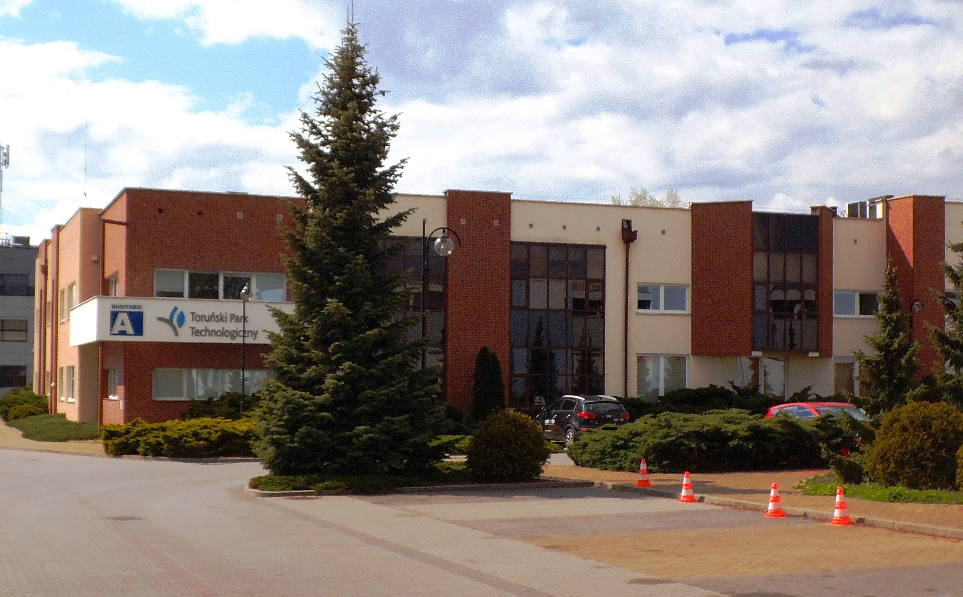 Toruńska Agencja Rozwoju Regionalnego